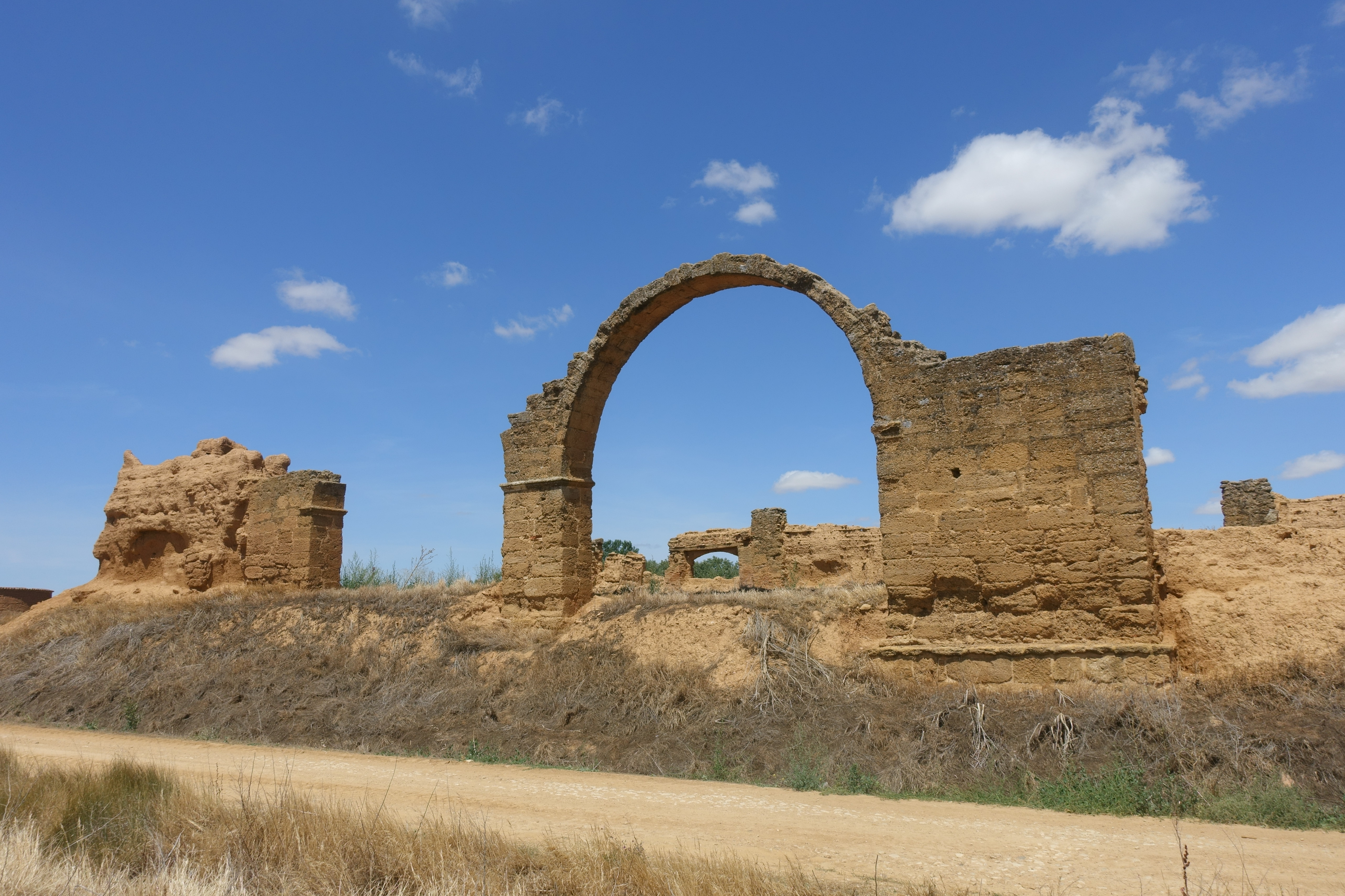 Ruinas de la iglesia de San Miguel, Barcial de la Loma (Valladolid, España).